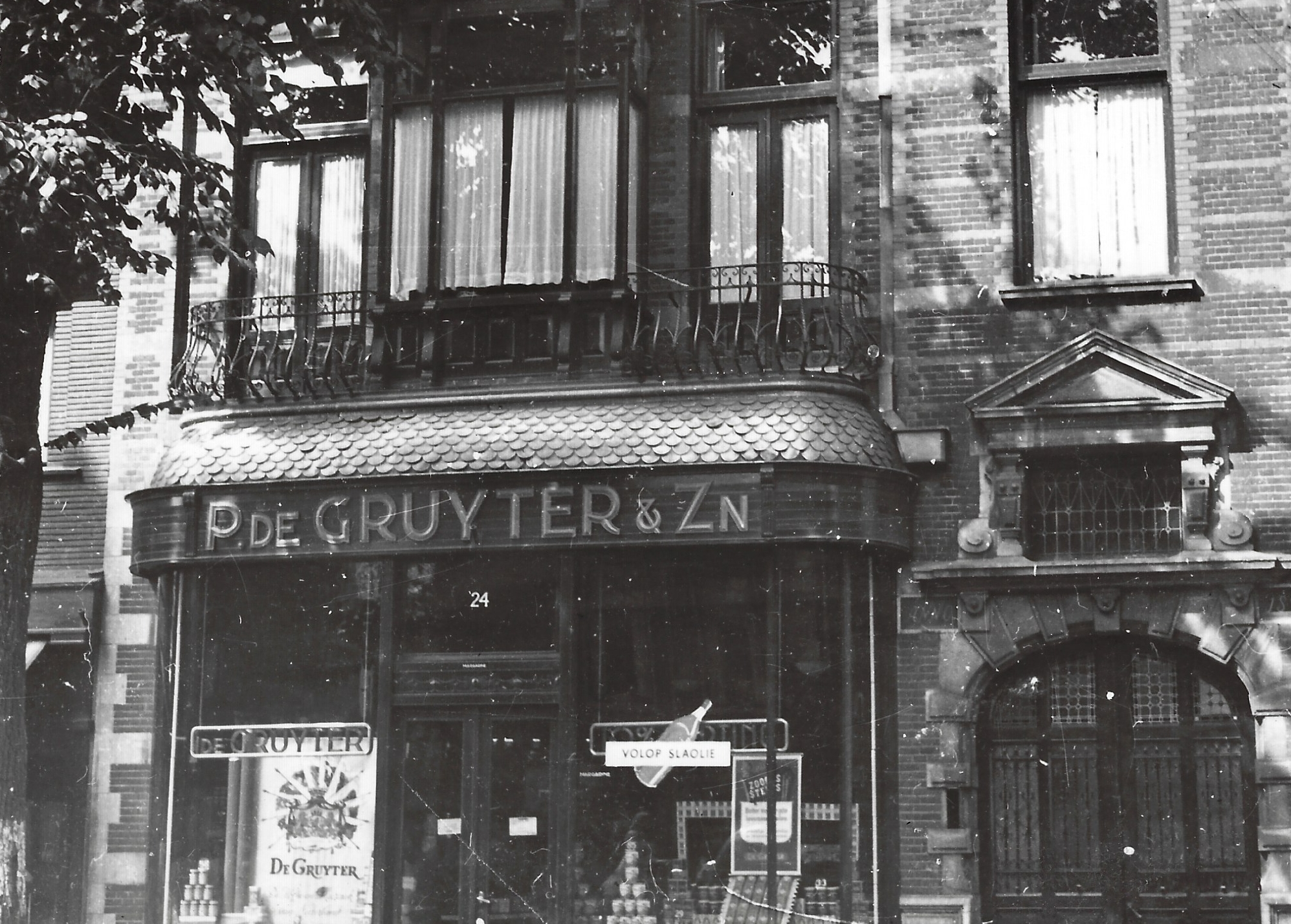 de Gruyter & Zn , Biltstraat te Utrecht anno 1907